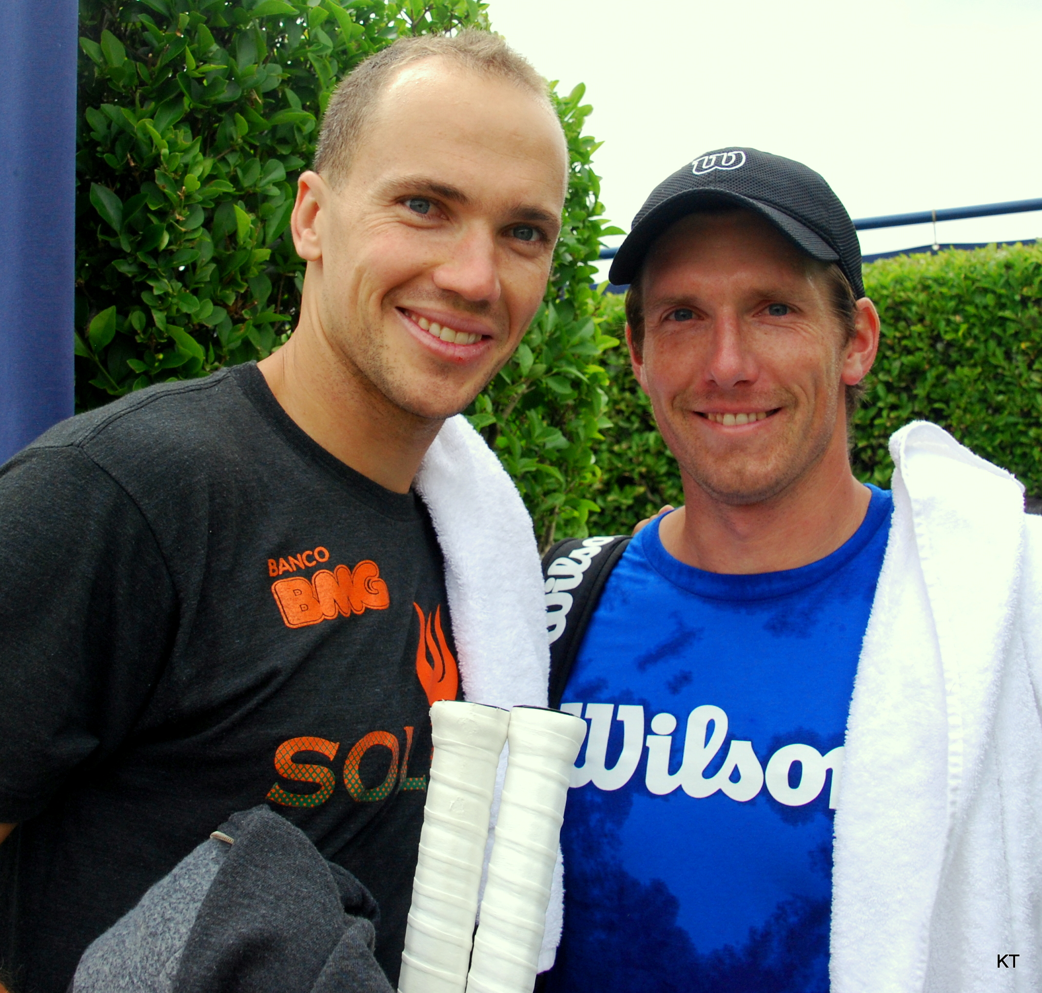 At Queens club 2013